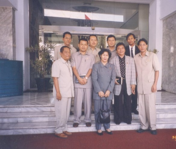 Agus Sutondo Bersama Anggota Komisi D DPRD Kota Depok